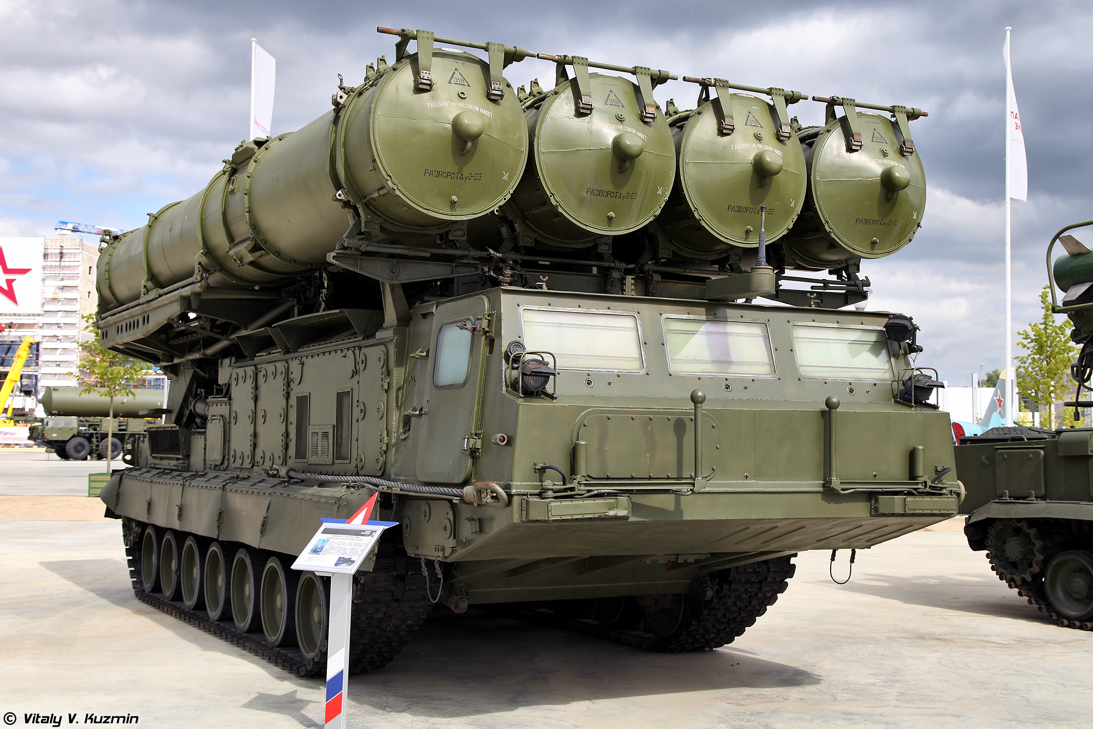 Пусковая установка 9А83 зенитной ракетной системы С-300В (9A83 TELAR for S-300V system)